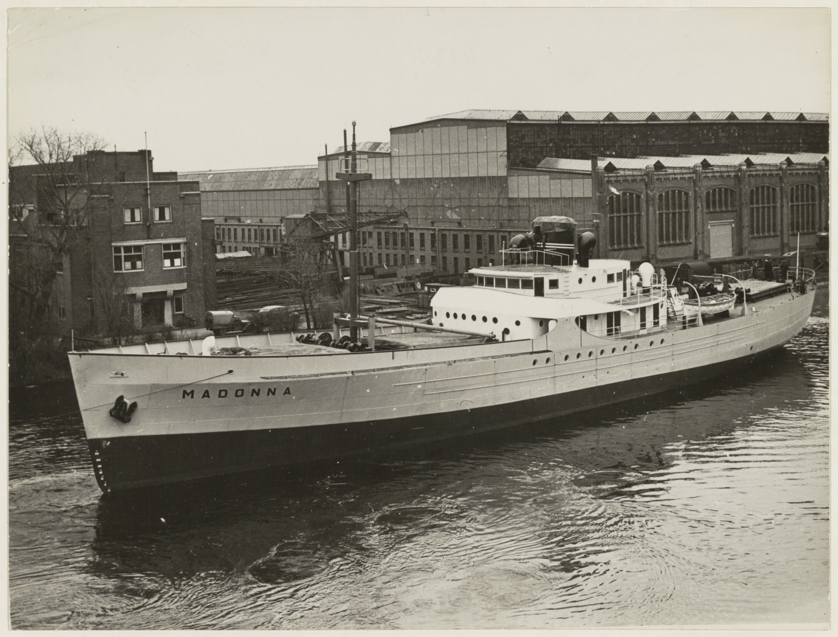 CollectieCollectie Fotoburo de BoerInventarisnummerNL-HlmNHA_54011223BeschrijvingNoorder Buiten Spaarne met het nieuw gebouwde schip 'Madonna', ziende naar het zuidoosten.FotonummerNL-HlmNHA_1478_4353DocumenttypeTopografische prenten, tekeningen en foto'sVervaardigerBoer, Cees de (1918-1985) Soort vervaardigerFotograaf LandNederland ProvincieNoord-Holland GemeenteHaarlem PlaatsHaarlem GeografischNoorder Buiten Spaarne Begindatum1949Einddatum1951TechniekFoto TrefwoordenSchepen